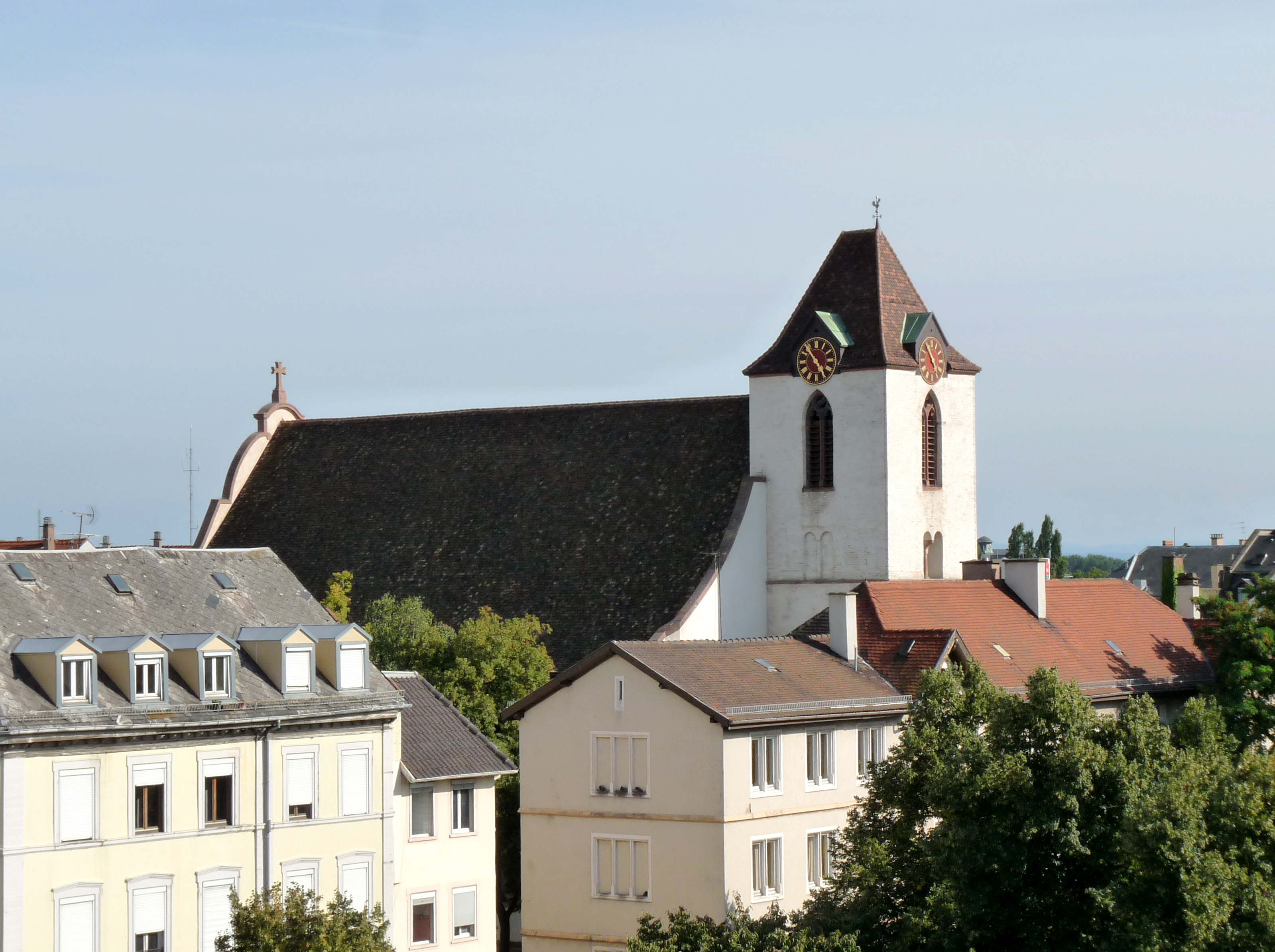 Eglise Sainte-Aurélie de Strasbourg, vue depuis la terrasse du parking Sainte-Aurélie